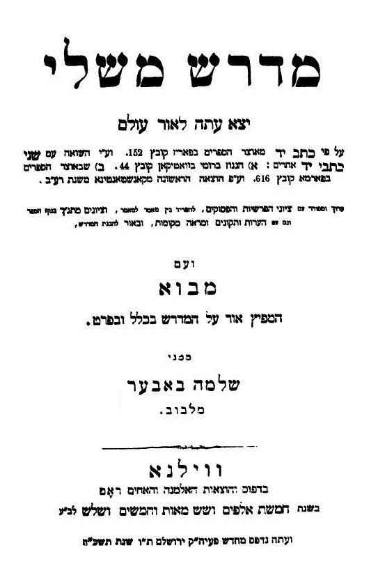 שער הספר מדרש משלי